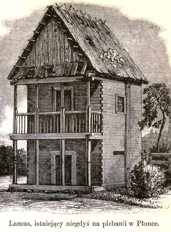 "Lamus, istniejący niegdyś na plebani w Płonce"